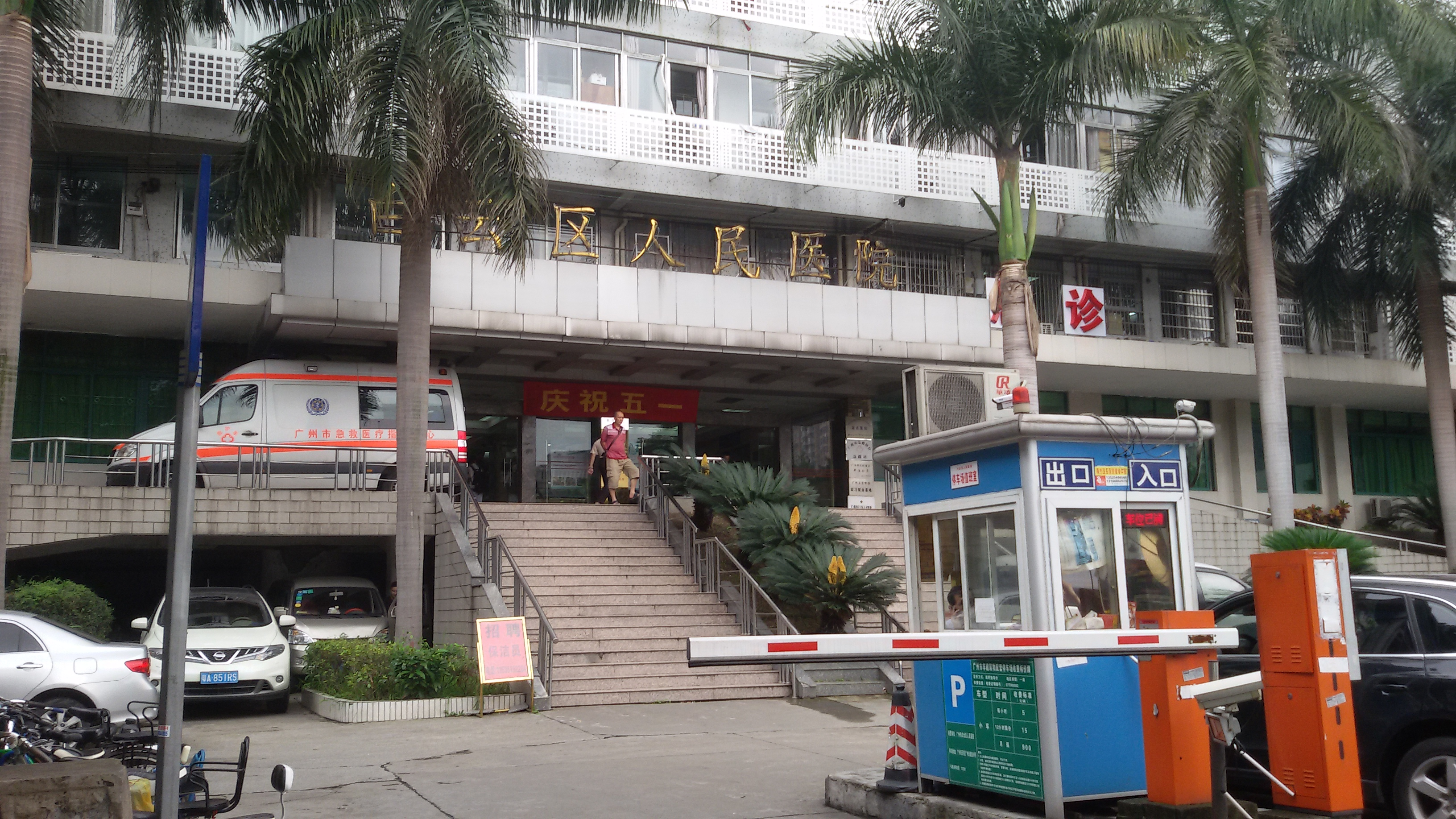 粵語: 白雲區人民醫院